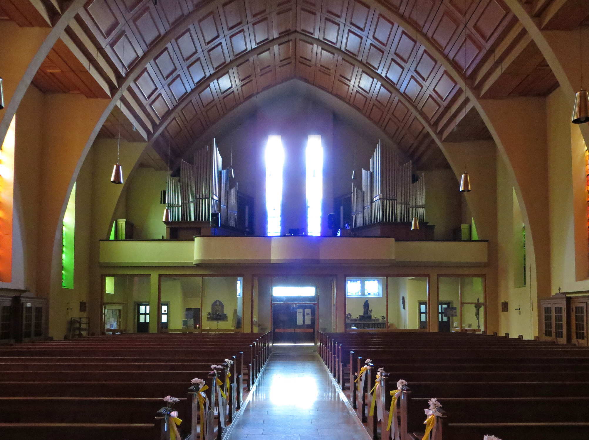 Blick ins Innere der kath. St. Marien-Kirche in Saabrücken-Herrensohr.